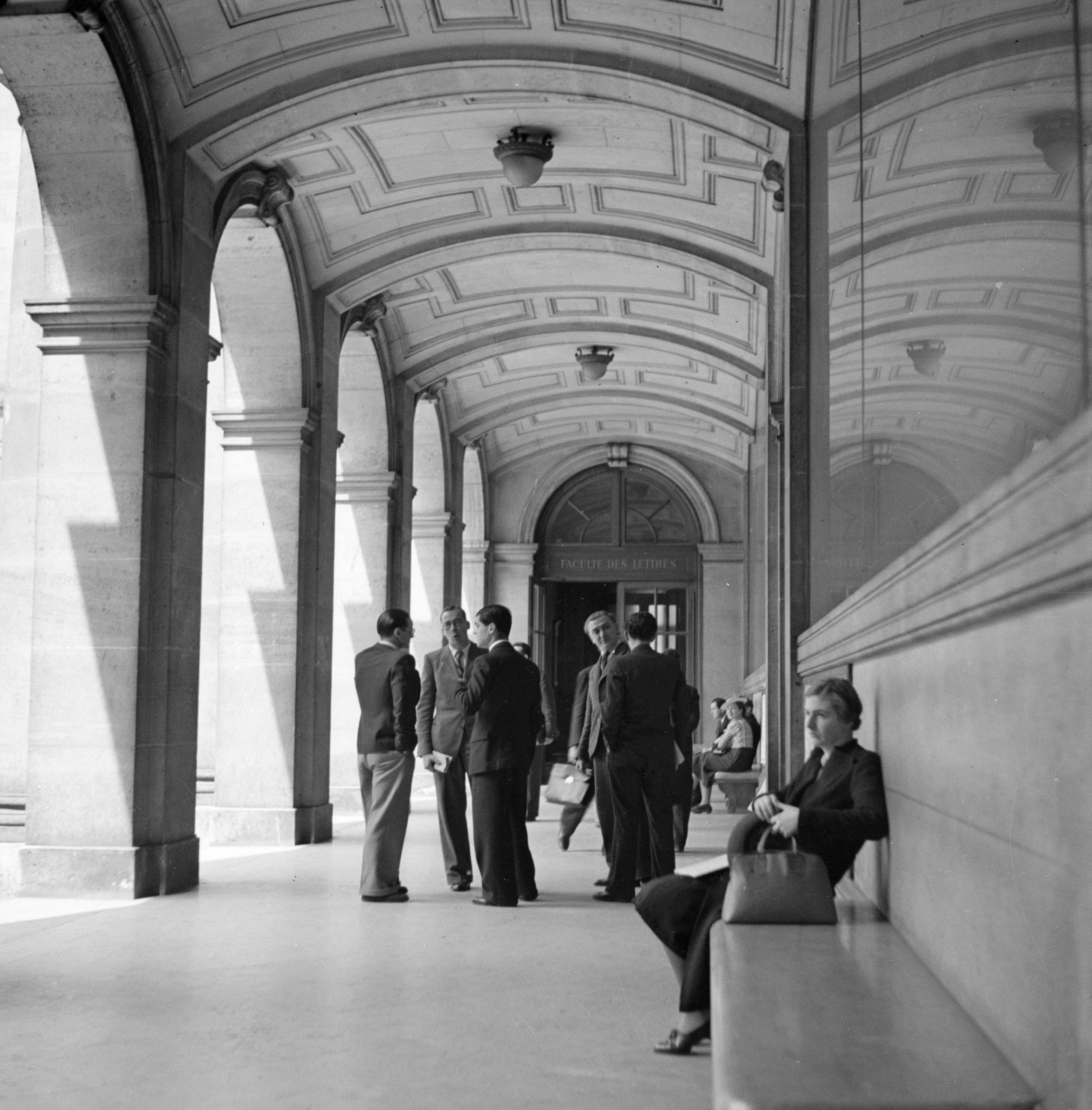 Collectie / Archief : Fotocollectie Van de Poll Reportage / Serie : Studenten aan de Universiteit van Parijs (Sorbonne) Beschrijving : Een arcade bij de Sorbonne Datum : 1948 Locatie : Frankrijk, Parijs Trefwoorden : arcades, studenten, universiteiten Fotograaf : Poll, Willem van de Auteursrechthebbende : Nationaal Archief Materiaalsoort : Negatief (6x6) Nummer archiefinventaris : bekijk toegang 2.24.14.02 Bestanddeelnummer : 254-2117